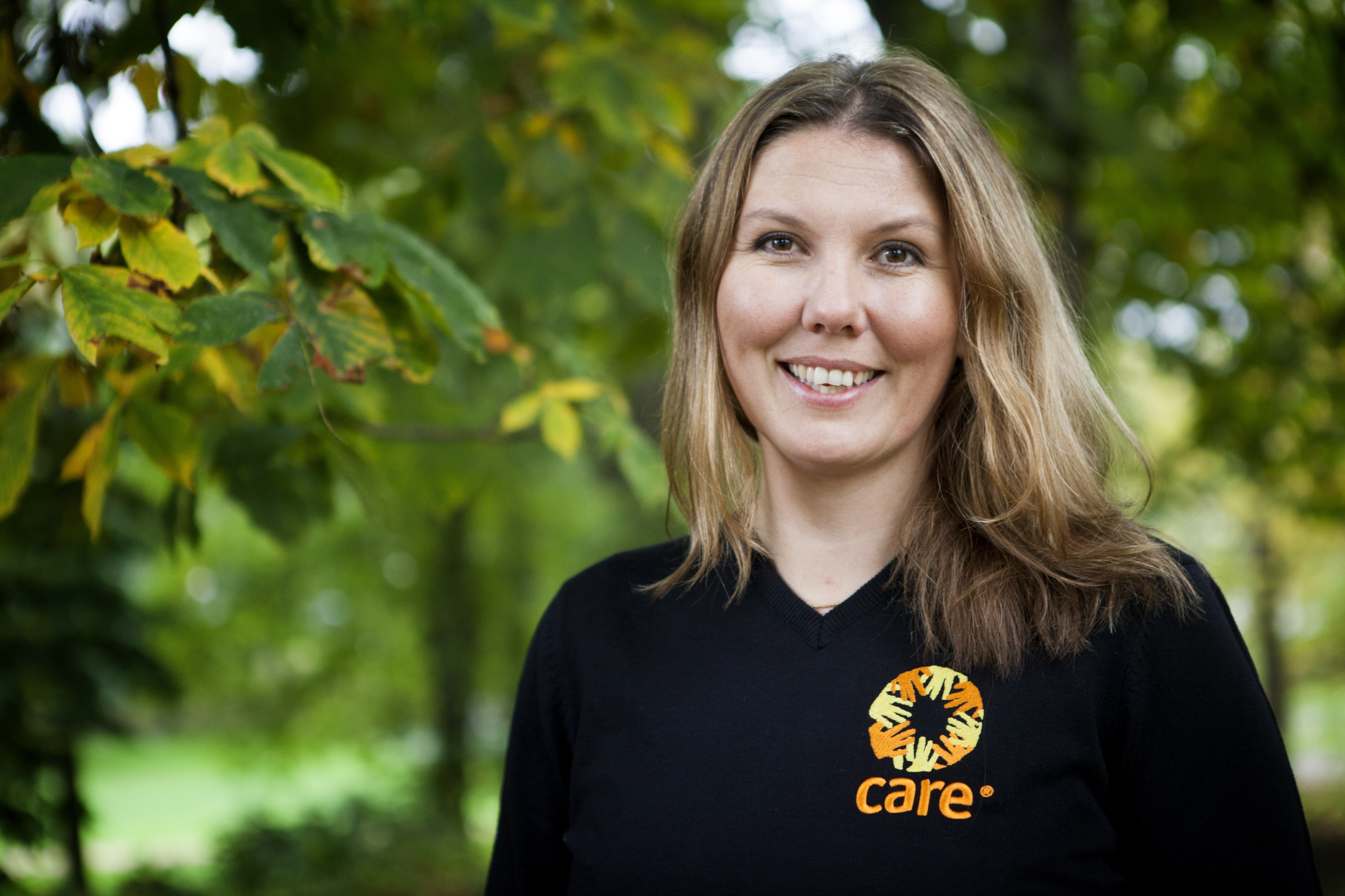 Gry Larsen. Foto: Gregory Rødland Buick